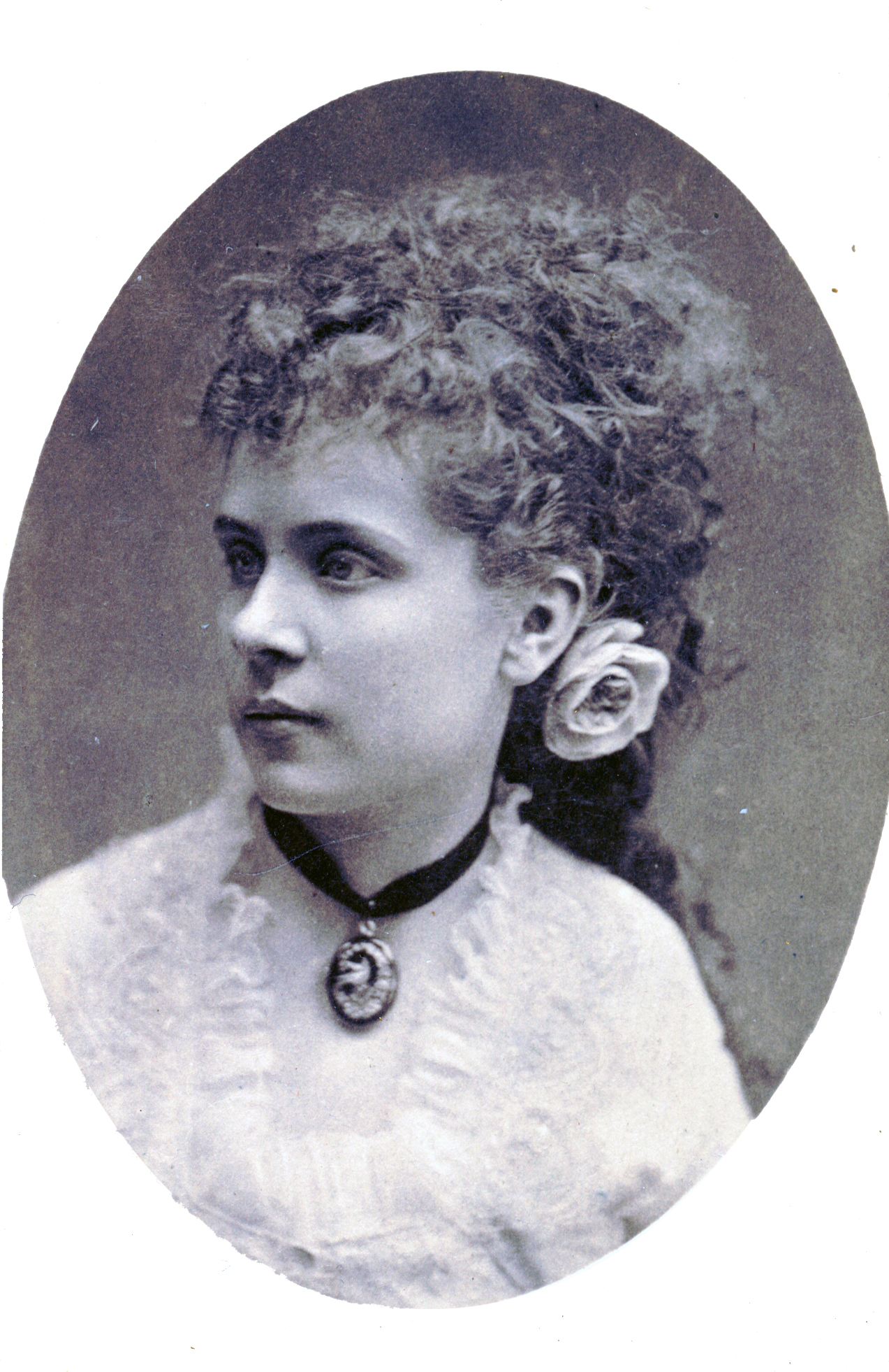 Siri Dahlqvist, skådespelare vid Mindre teatern 1874